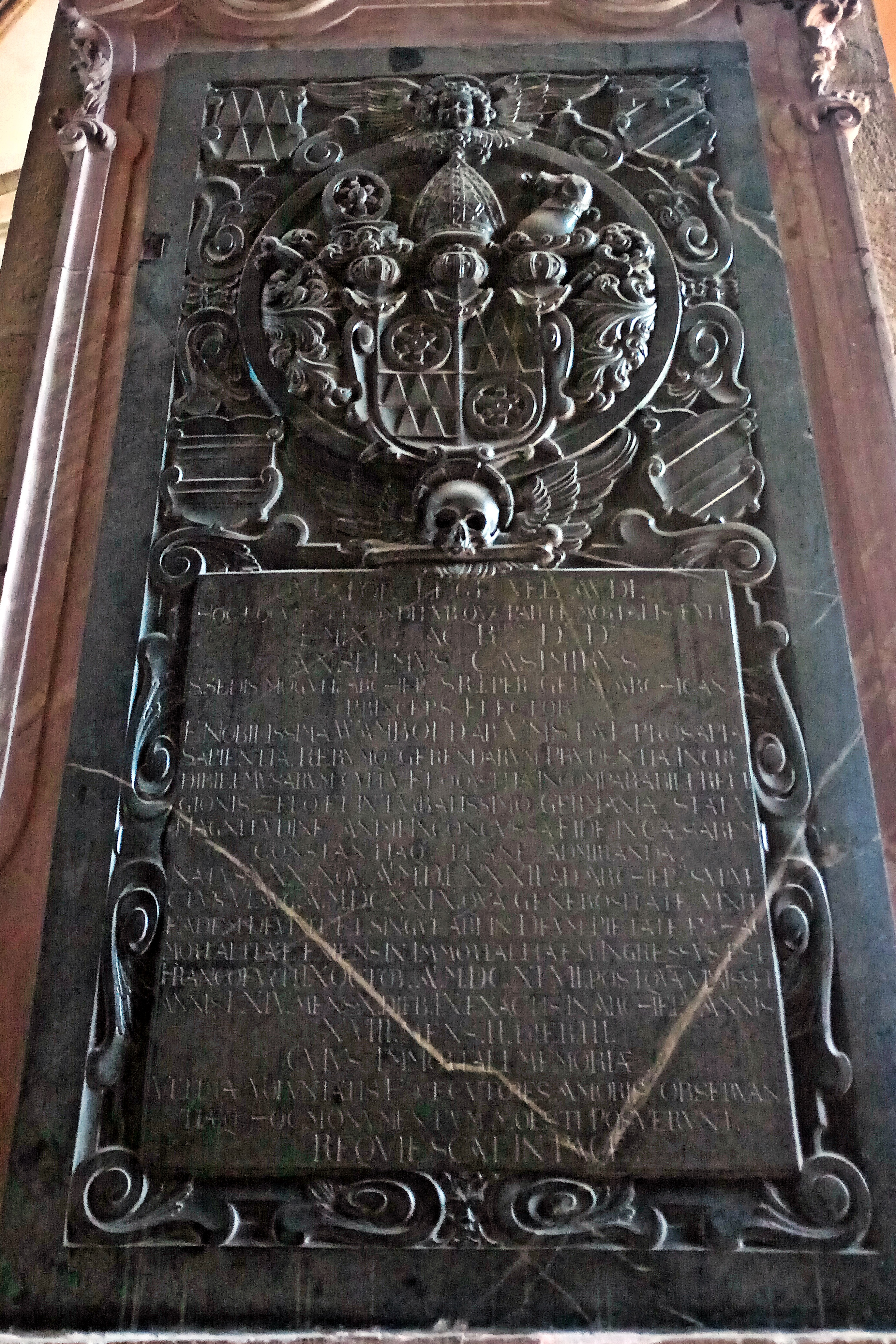 Mainzer Dom, Epitaph von Bischof Anselm Casimir Wambolt von Umstadt (+ 1647)